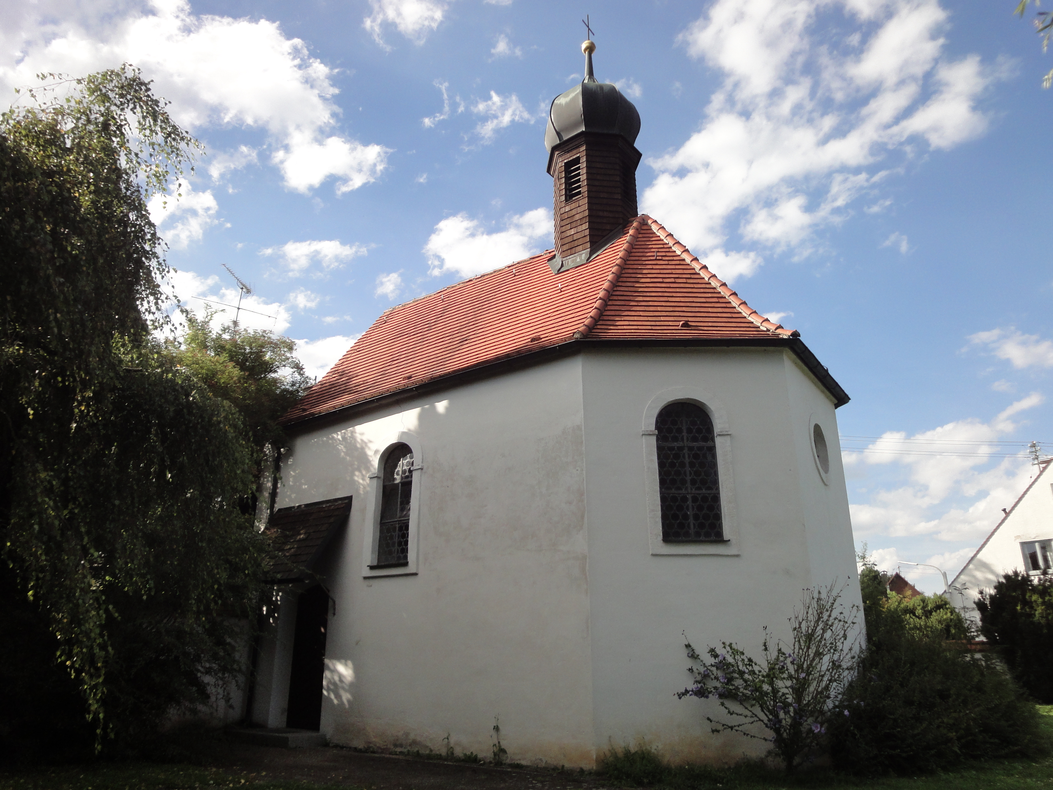 Kapelle St. Antonius von Padua, Saalbau mit dreiseitigem Schluss und Dachreiter mit Zwiebelhaube, spätes 16. Jahrhundert, Dachreiter 19. Jahrhundert; mit Ausstattung; Reste der ehem. Friedhofsmauer, mit Stichbogenblenden, 16./17. Jahrhundert